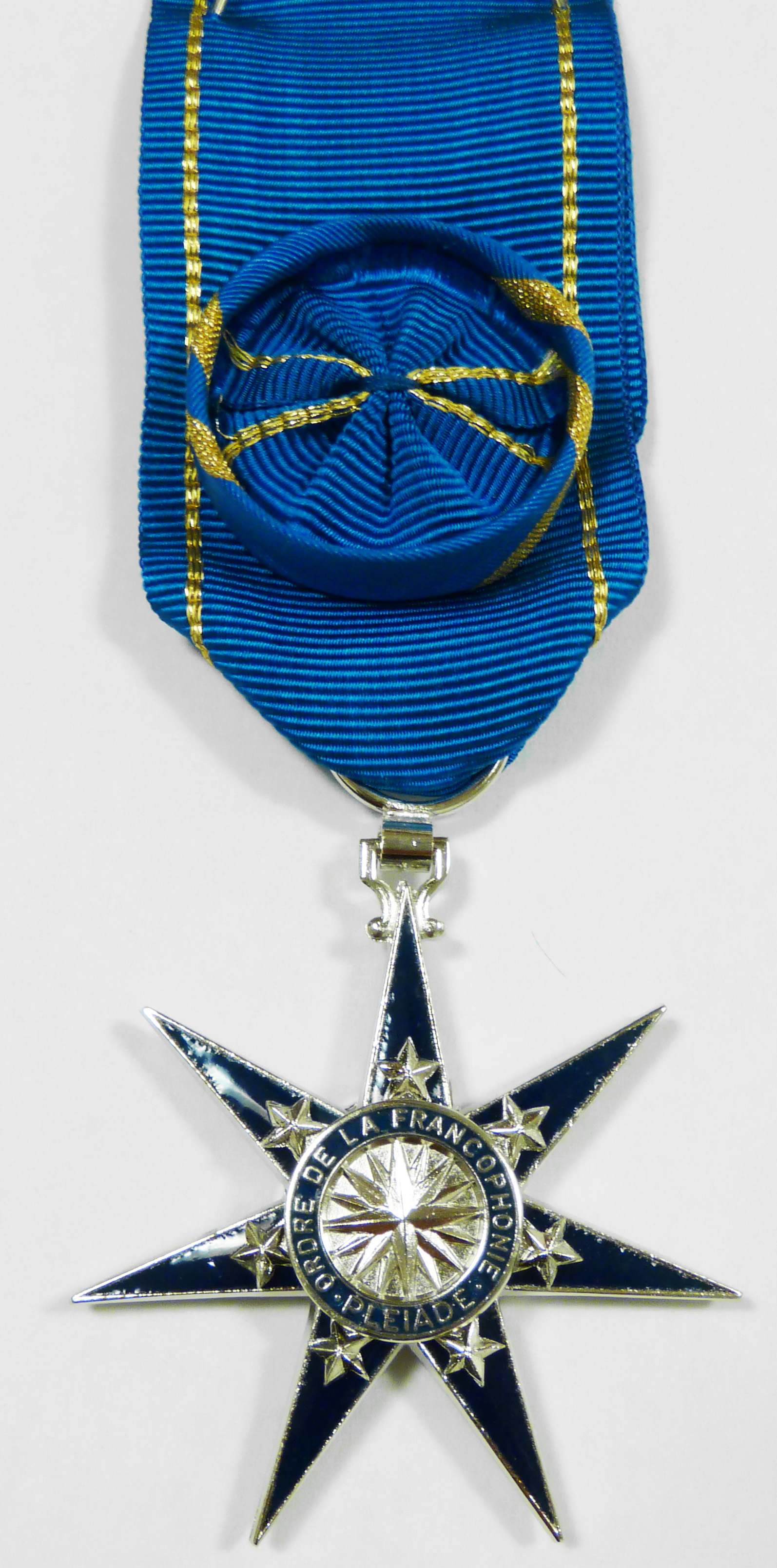 Médaille d'Officier de l'Ordre de la Pléiade, ordre de la Francophonie et du dialogue des cultures de l'Assemblée parlementaire de la Francophonie.